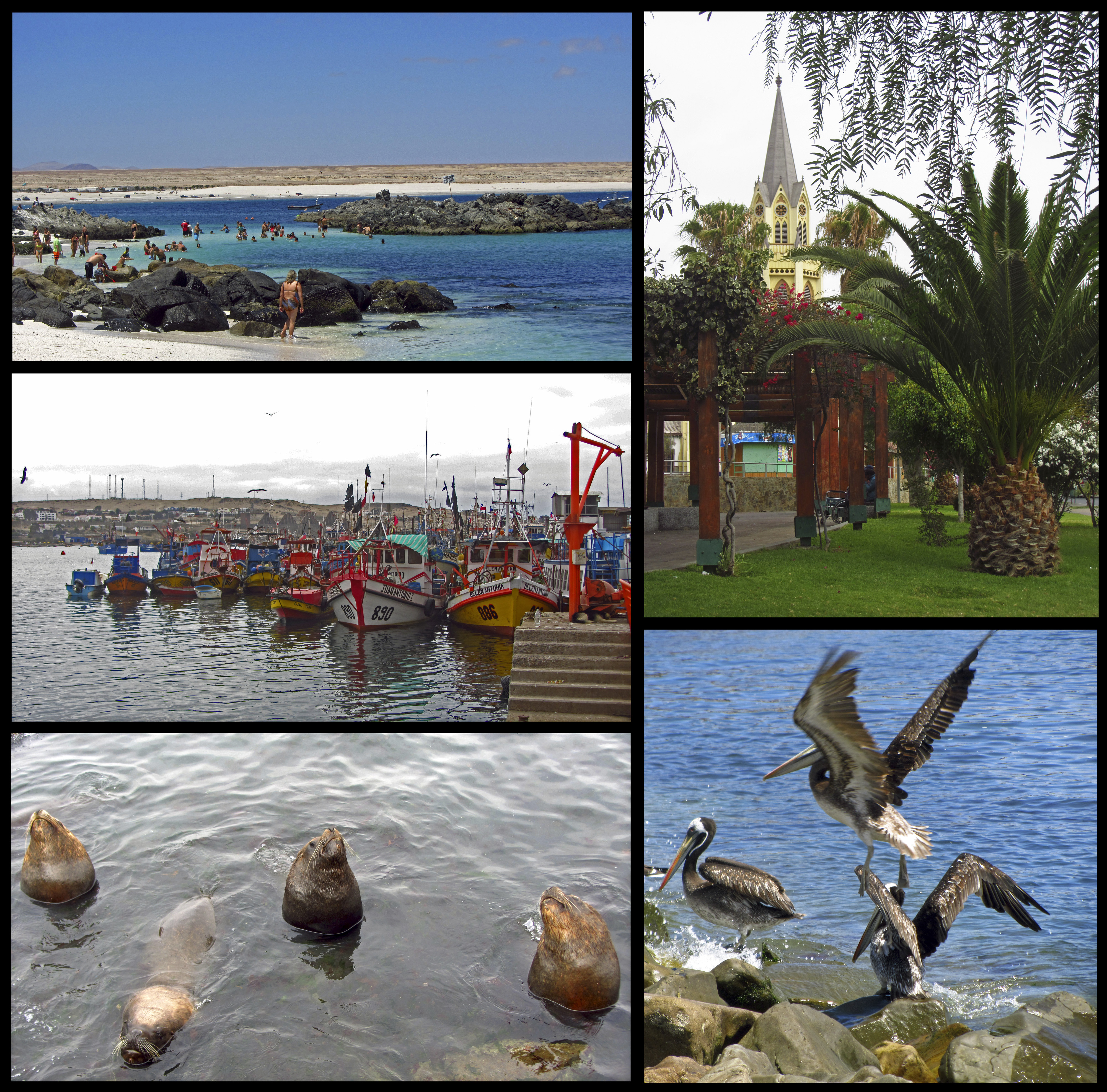 Comunda de Caldera, Región de Atacama, Chile 1. Bahía Inglesa 2. Plaza e iglesia de Caldera 3. Caleta de Caldera 4. Lobería 5. Pelícanos Febrero de 2016